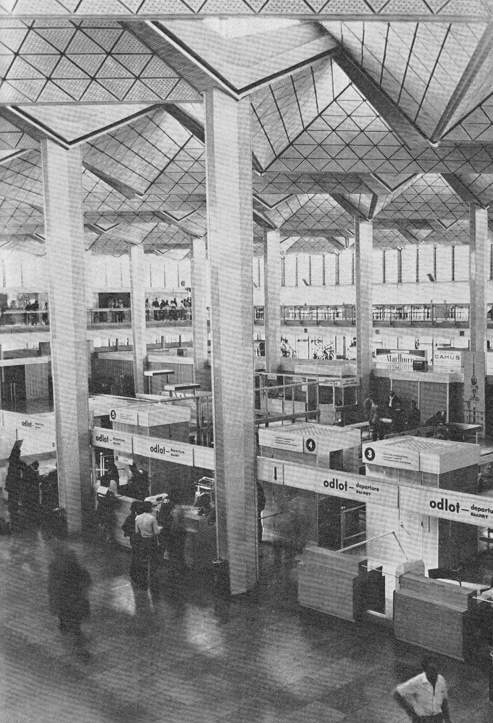 Port lotniczy Okęcie w Warszawie